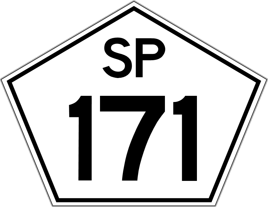 Escudo com a numeração da Rodovia Paulo Virgínio e Rodovia Vice-Prefeito Salvador Pacetti